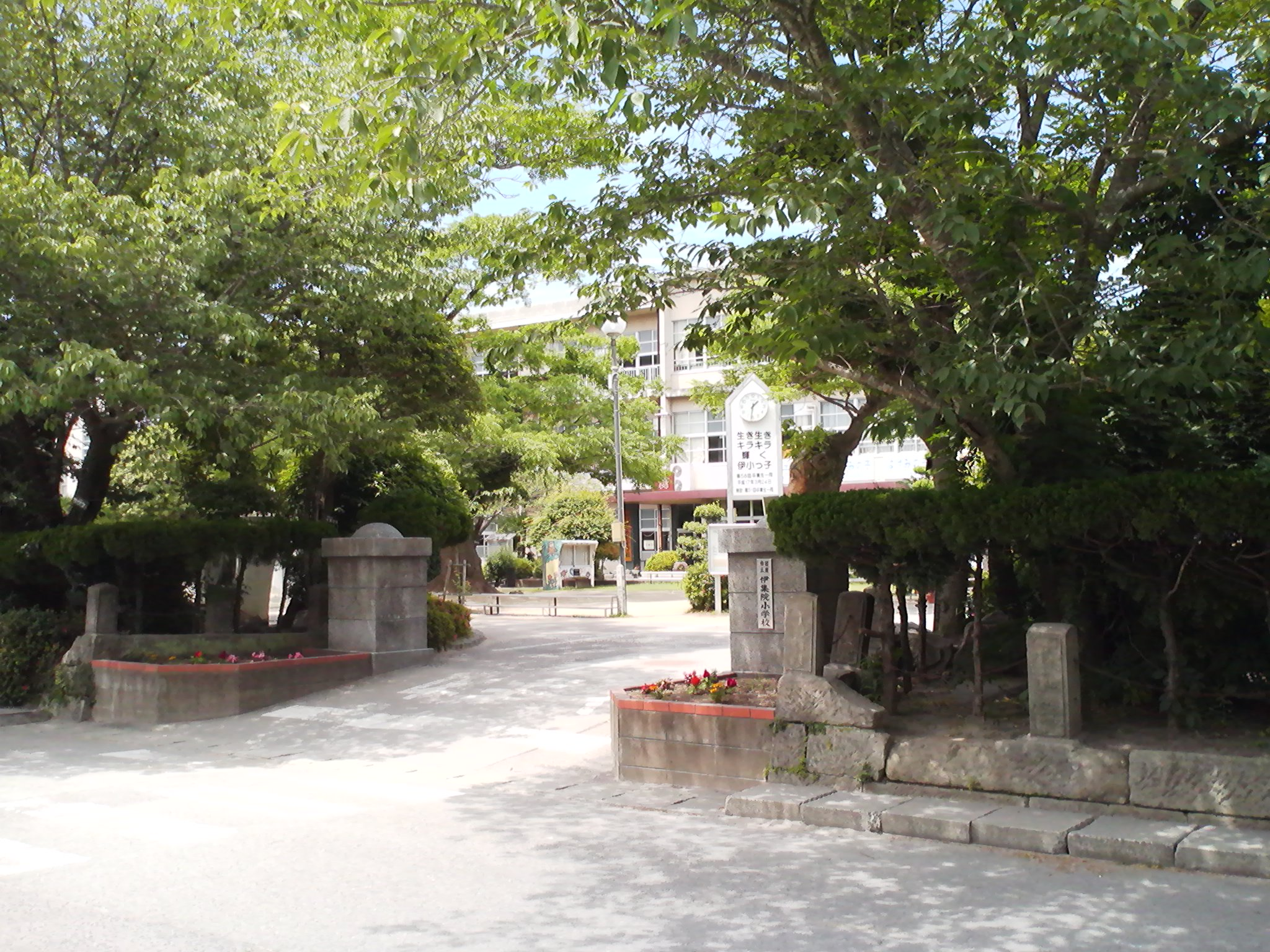 日置市立伊集院小学校の外観。